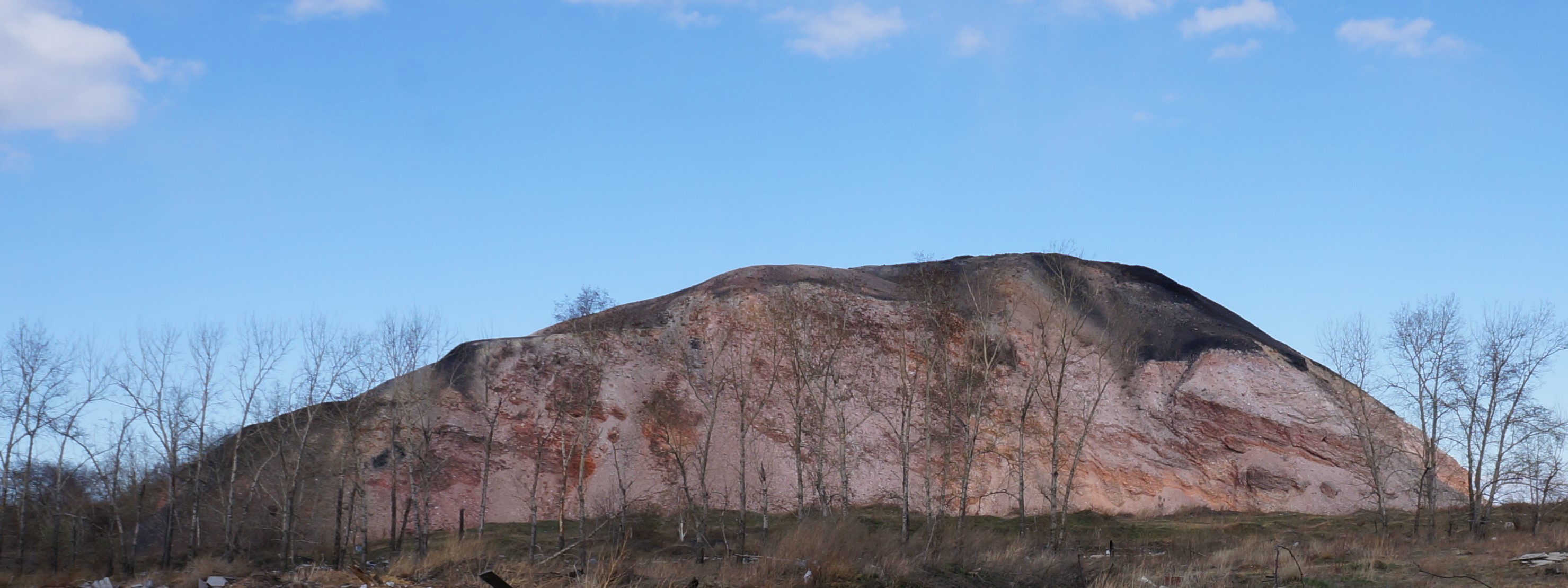 Останки террикона бывшей шахты № 8 города Черемхово Иркутской области. Съёмка произведена для сайта shadrinka.ru